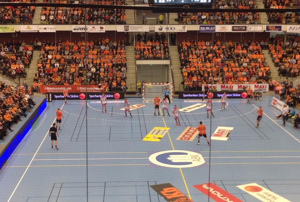 Partido entre el IFK Kristianstad y el HK Malmö.